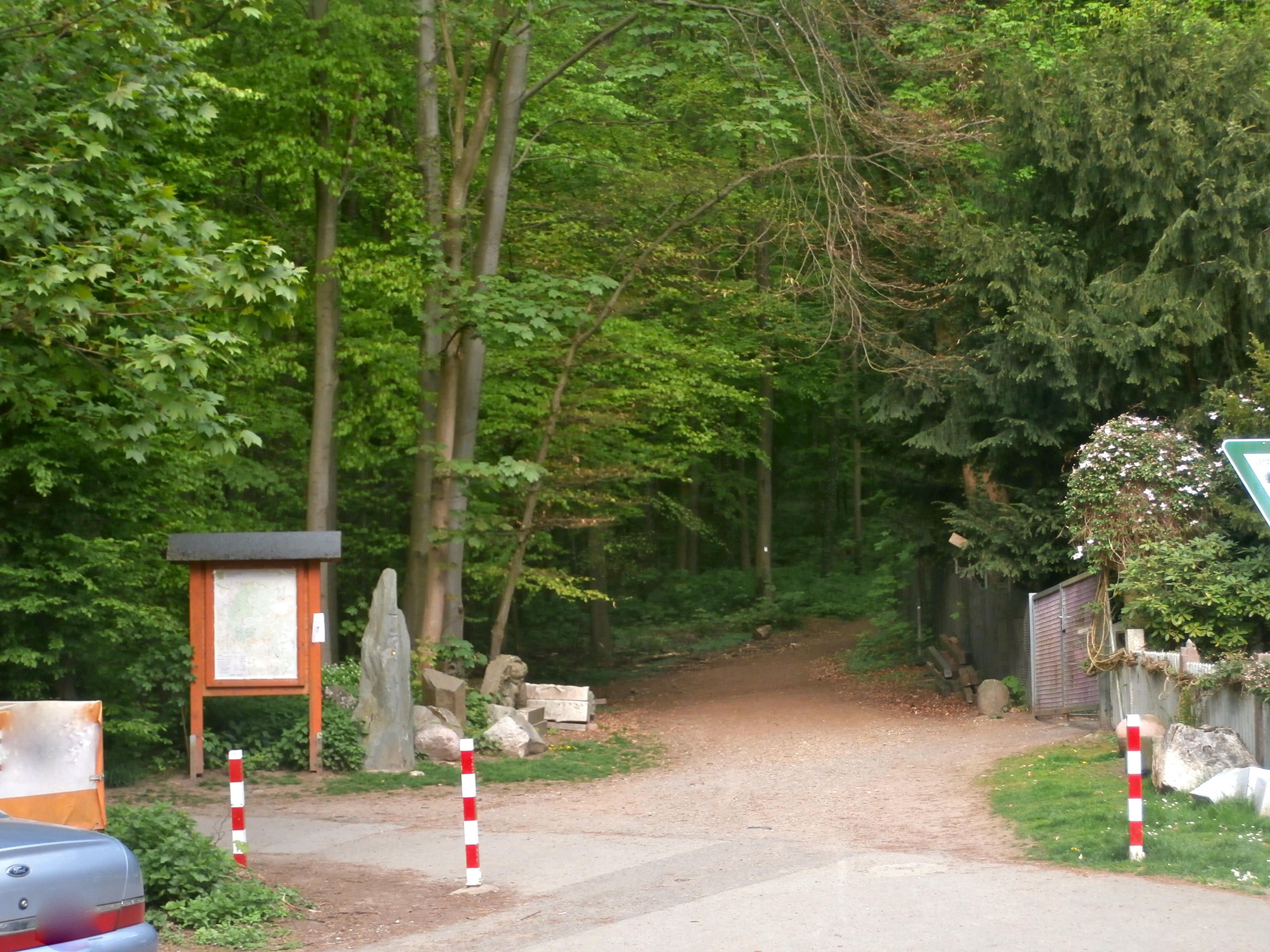 Eingang des Gerresheimer Waldes in Düsseldorf